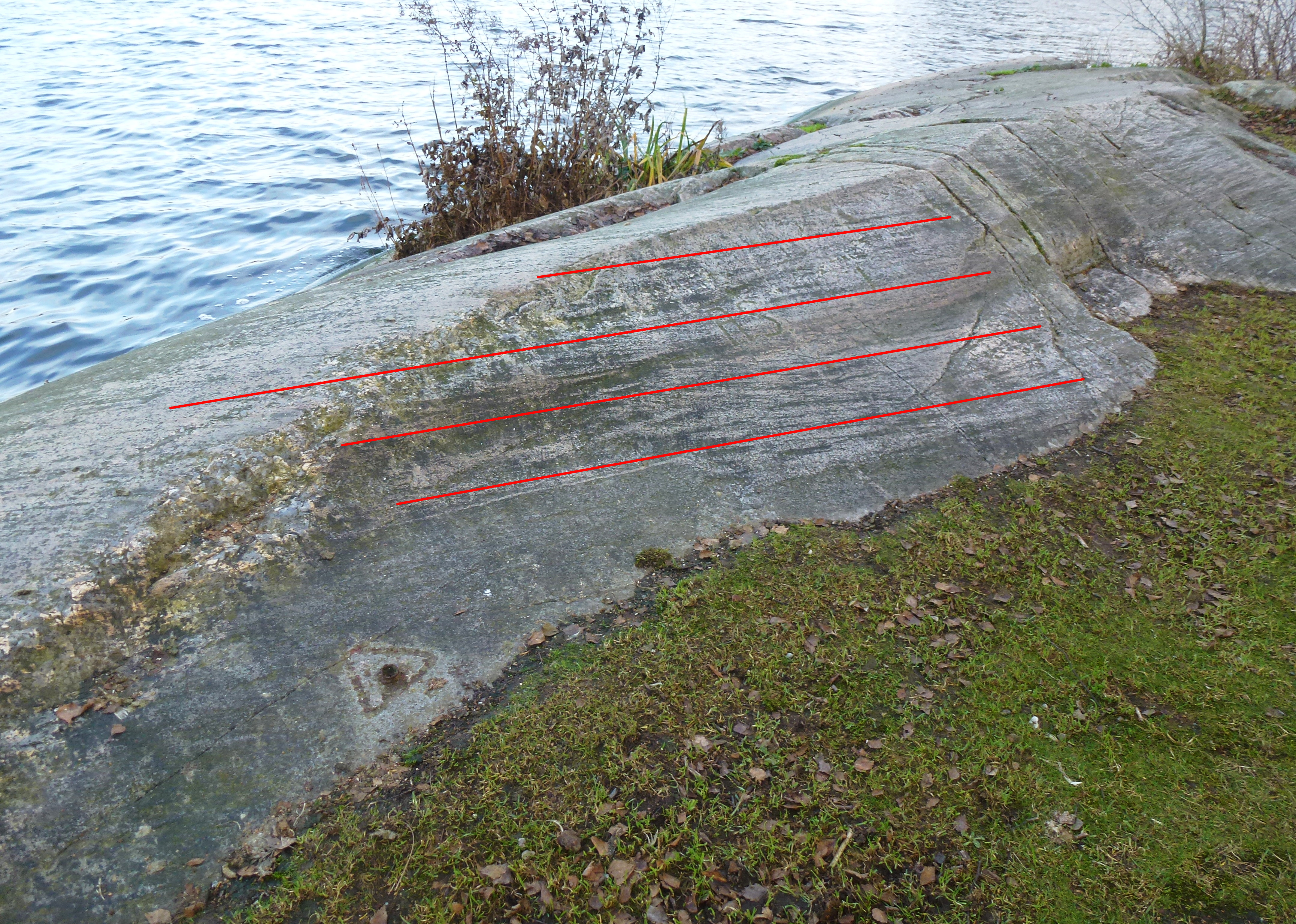 Råstahällen vid Råstasjön med slipmärken (röd) efter inlandsisen